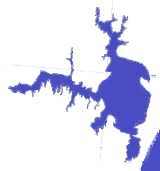 author: Ben Fredlund